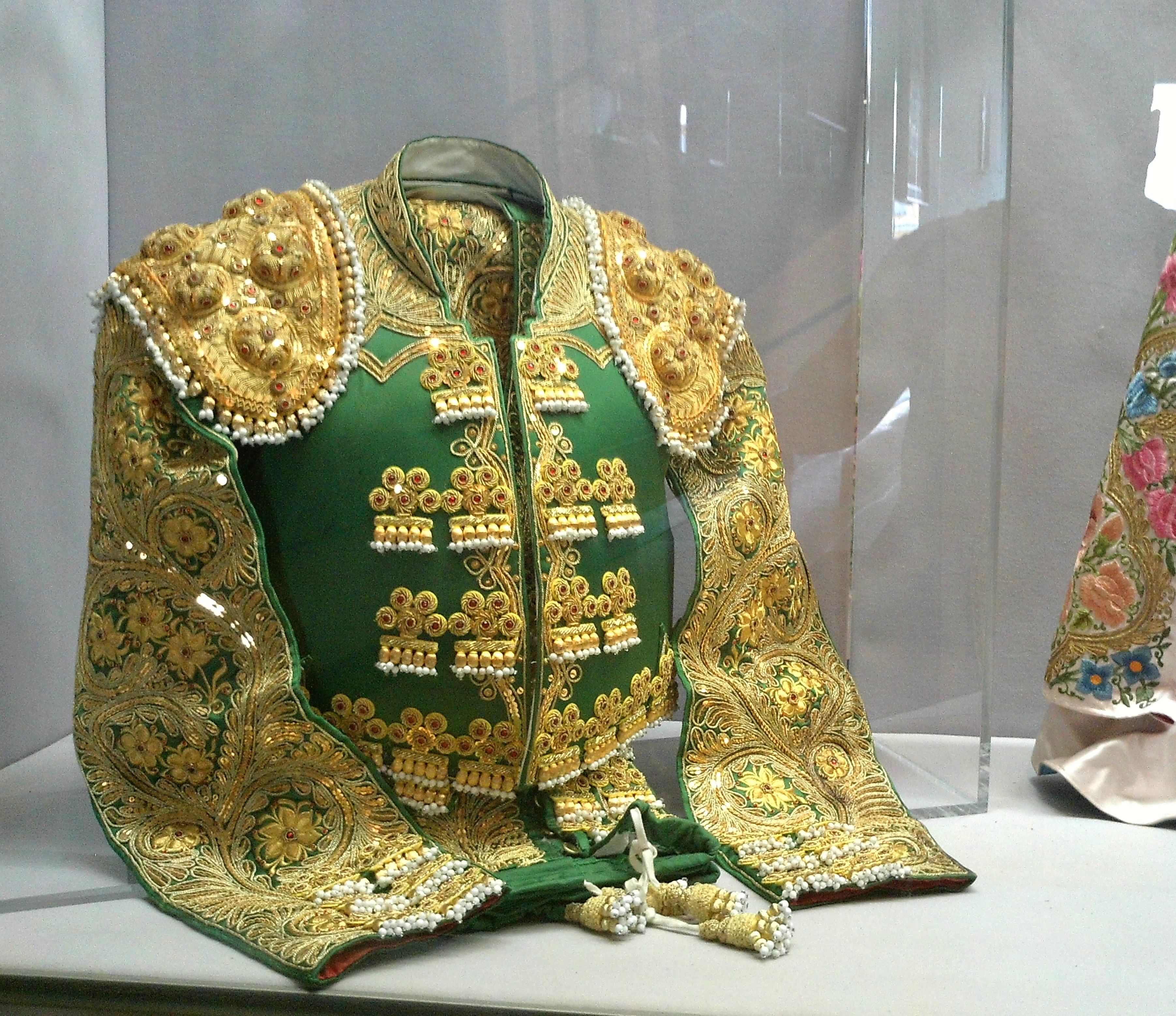 Chaquetilla de torero. Museo de la Hermandad de la Macarena. Sevilla, Andalucía, España.